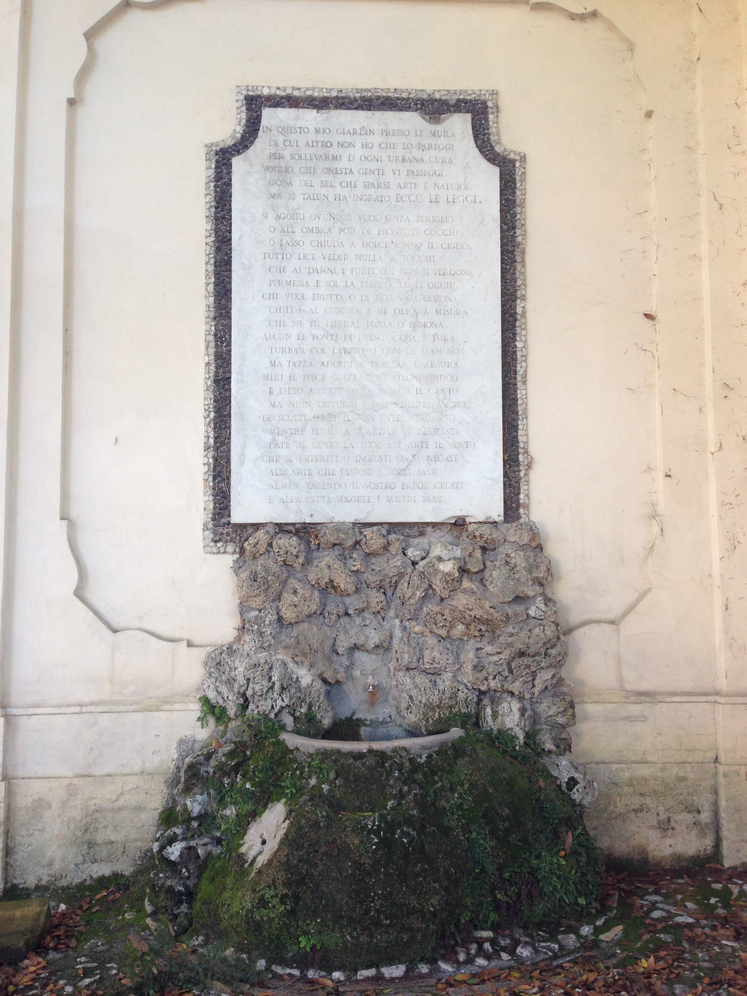 Villa Redenta, fontanella di pietra calcarea. Spoleto